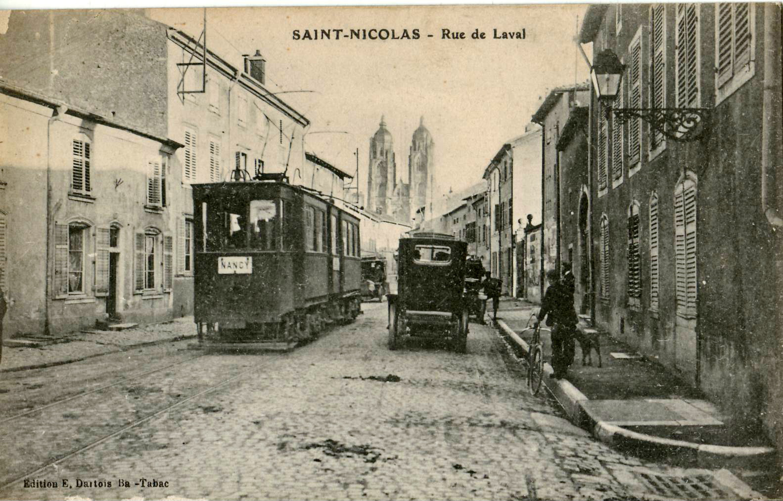 Carte postale ancienne éditée par E. Dartois, bar-tabac ; SAINT-NICOLAS - Rue de Laval. Vue d'une rame de la ligne de tramway Nancy (Marché) - Dombasle-sur-Meurthe de la compagnie des tramways suburbains